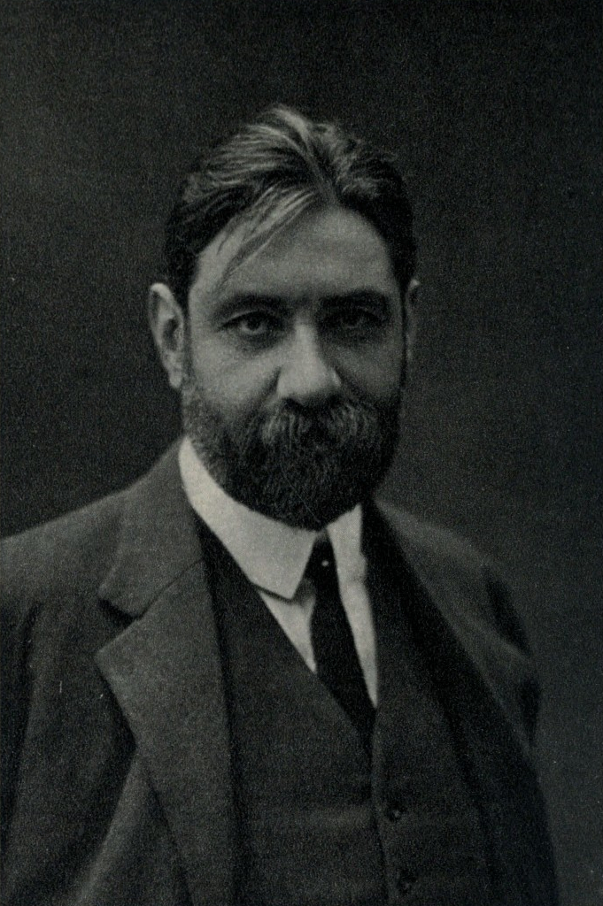 pièce de Paul Spaak (avocat et écrivain belge (1871 – 1936))